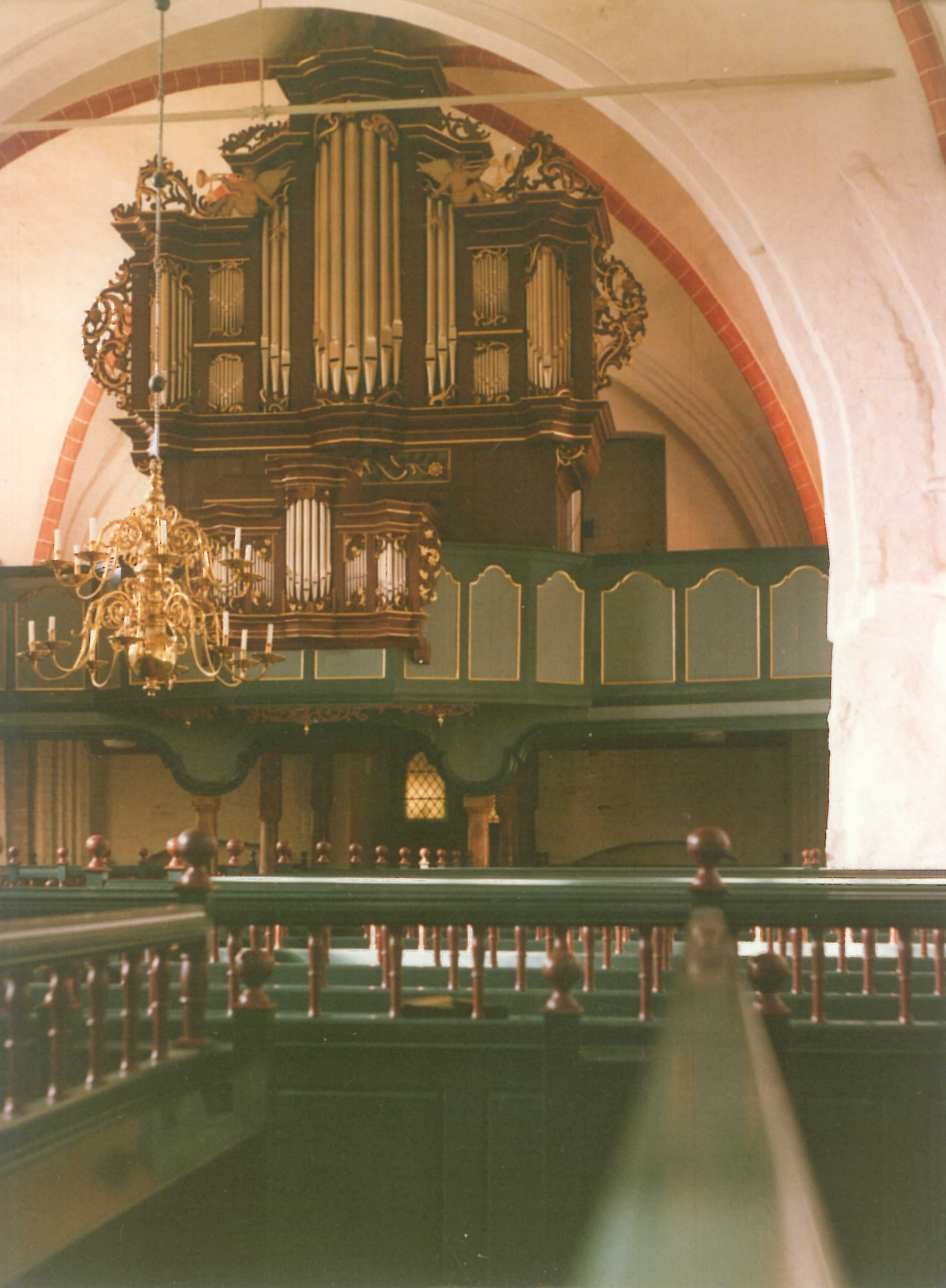 Orgel in Remels, St. Martin